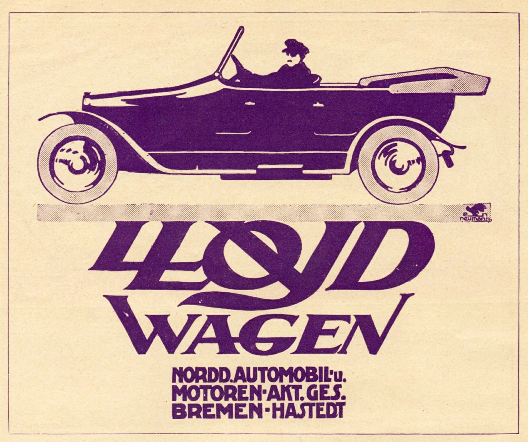 Advertisemsnt for 1913 Lloyd Tourer